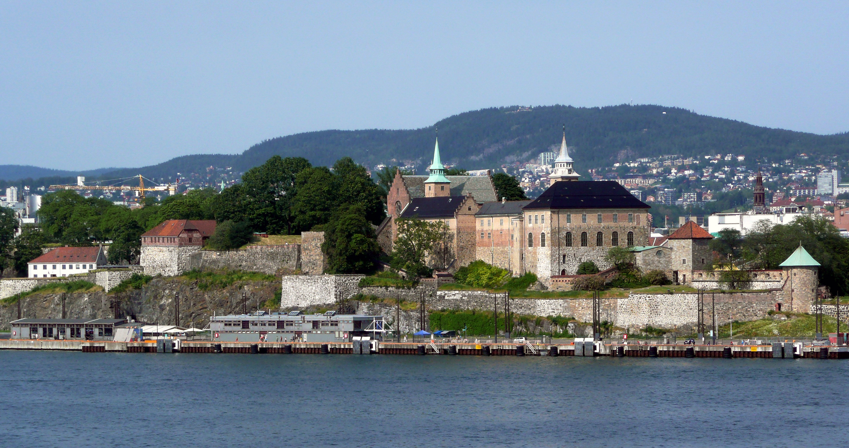 Akershus